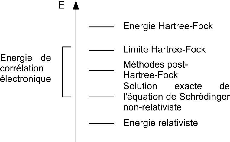 Diagramme d'énergie selon approche quantique (version *.png)